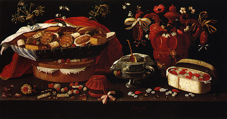 Still Life